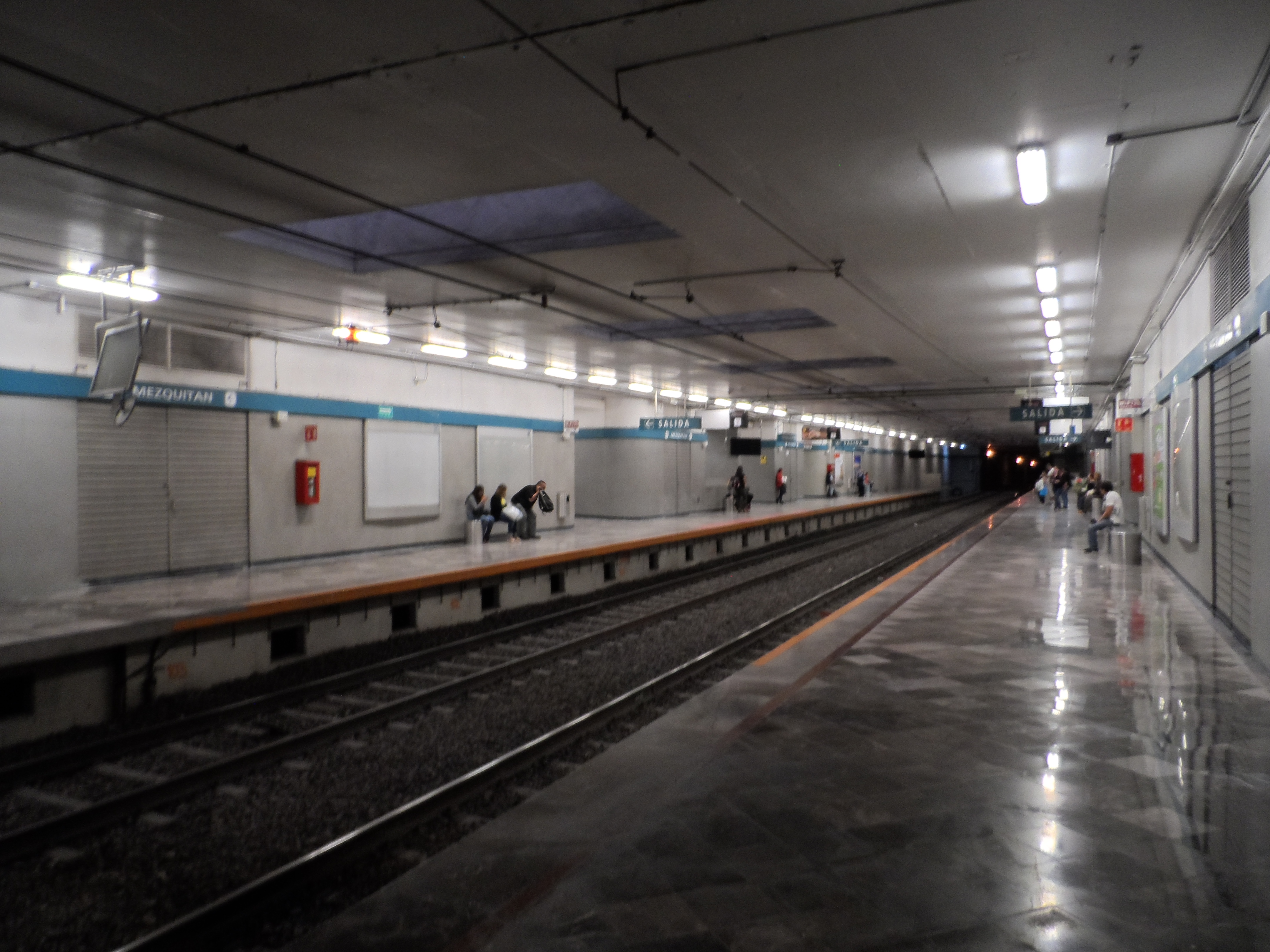 La estación "Mezquitán" de la Línea 1 del Tren Ligero de Guadalajara.